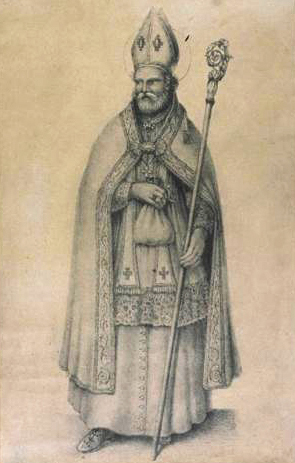 Litografia ritraente Sant’Alberto Quadrelli, copatrono della diocesi di Lodi, conservata nella Biblioteca Laudense.